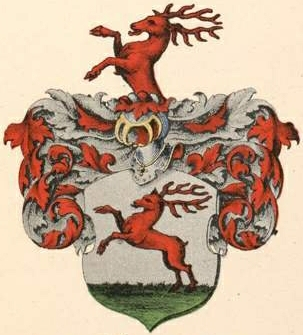 Bocki (Lahmuse) suguvõsa aadlivapp